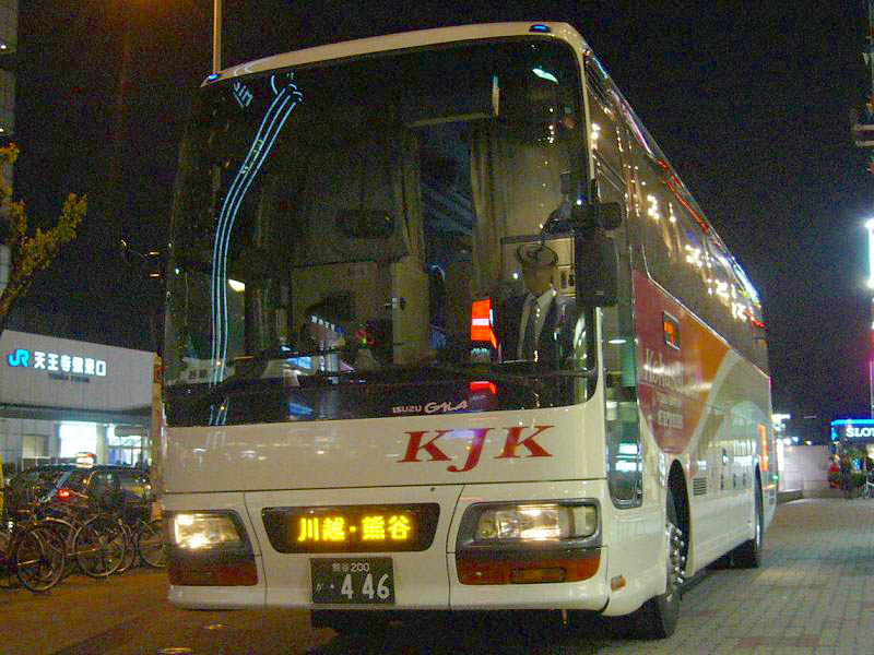 登録番号 熊谷200か・446 国際十王バス所属 ウィングライナー号用 2007年4月23日 あべの橋バスステーションにて撮影 撮影者 Tokatsu kokubu